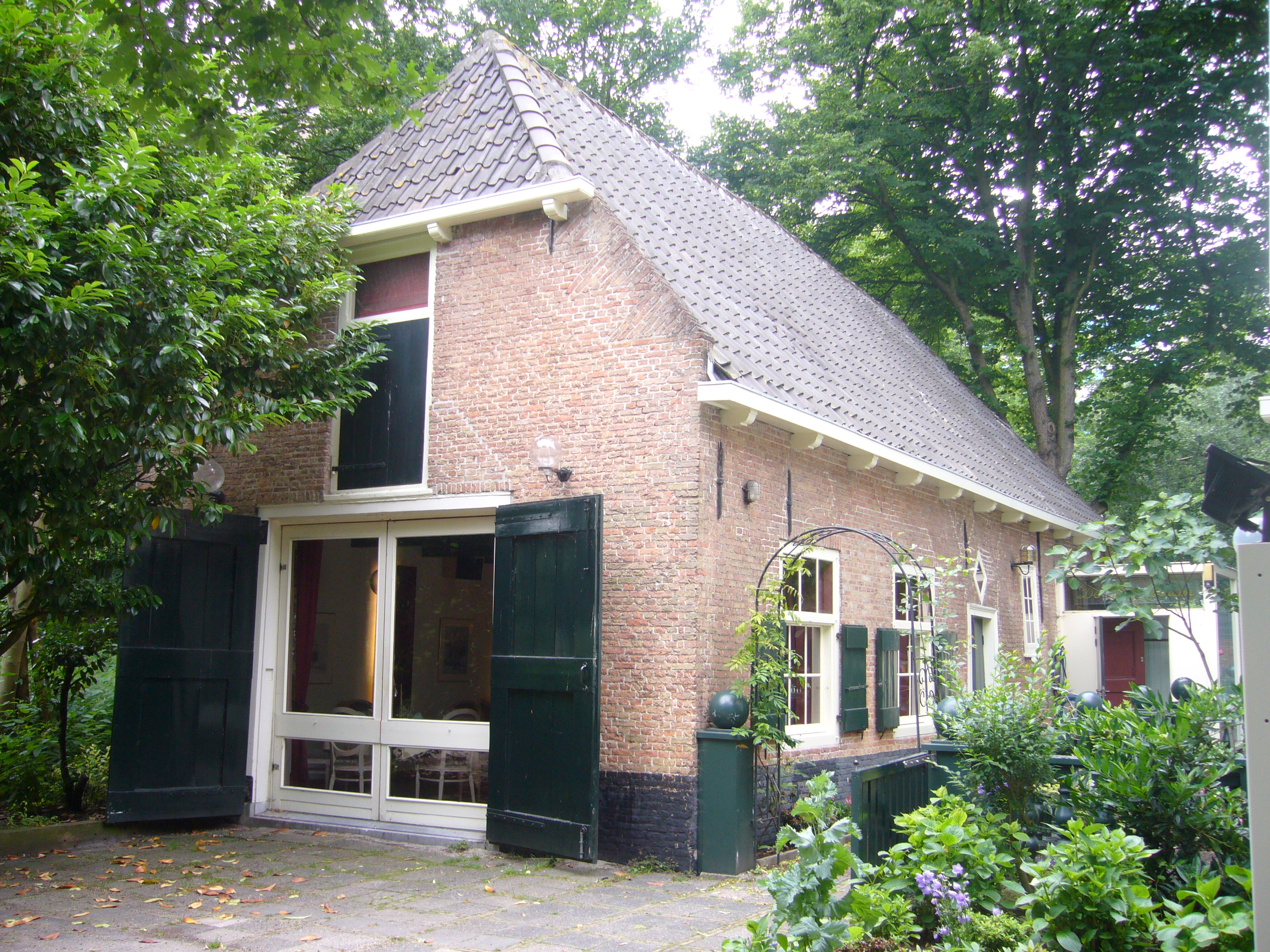 Landgoed Meer en Bos, Den Haag, de oude boerderij